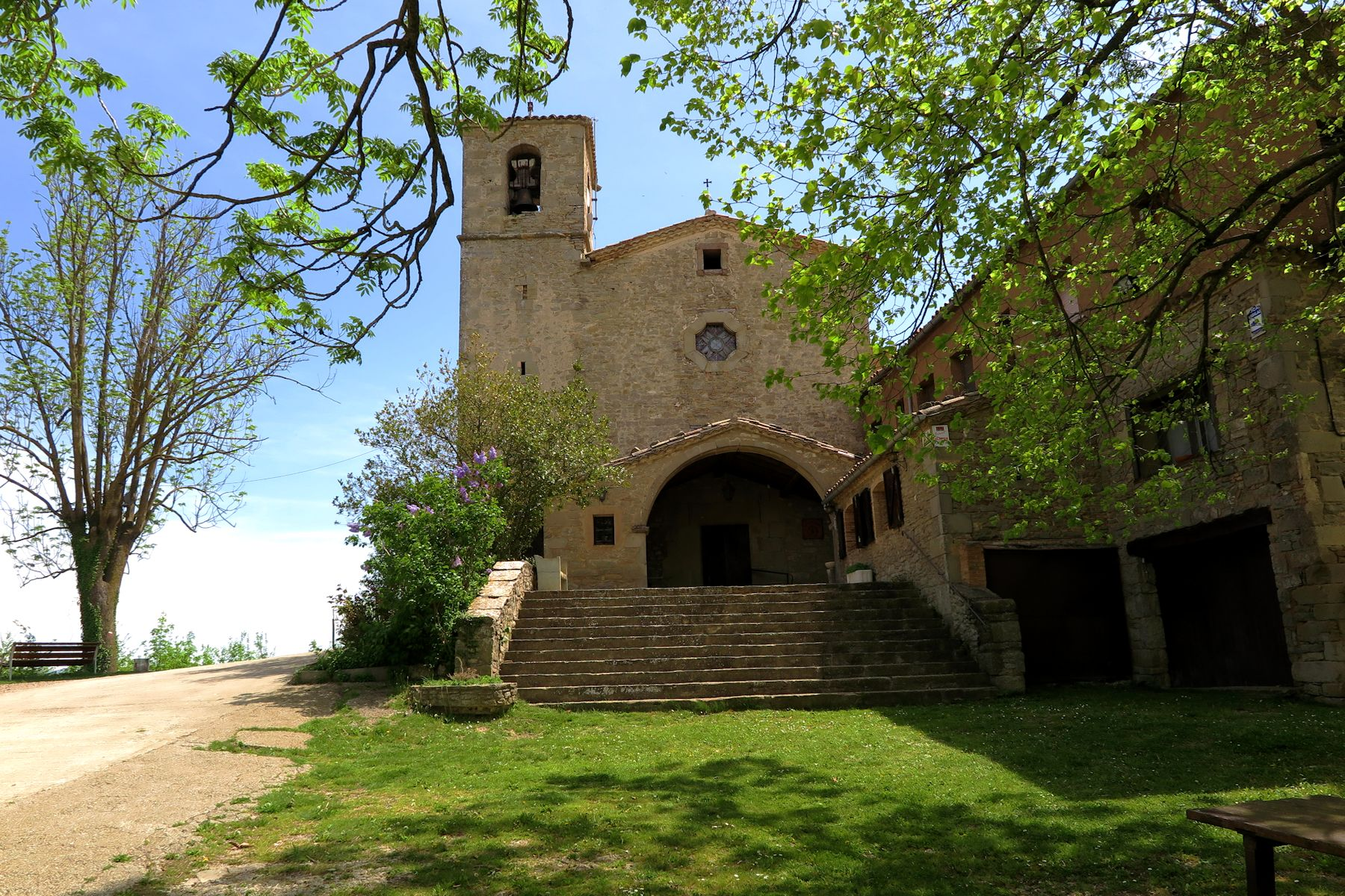 Santuari que pertany al municipi de Sant Agustí de Lluçanès